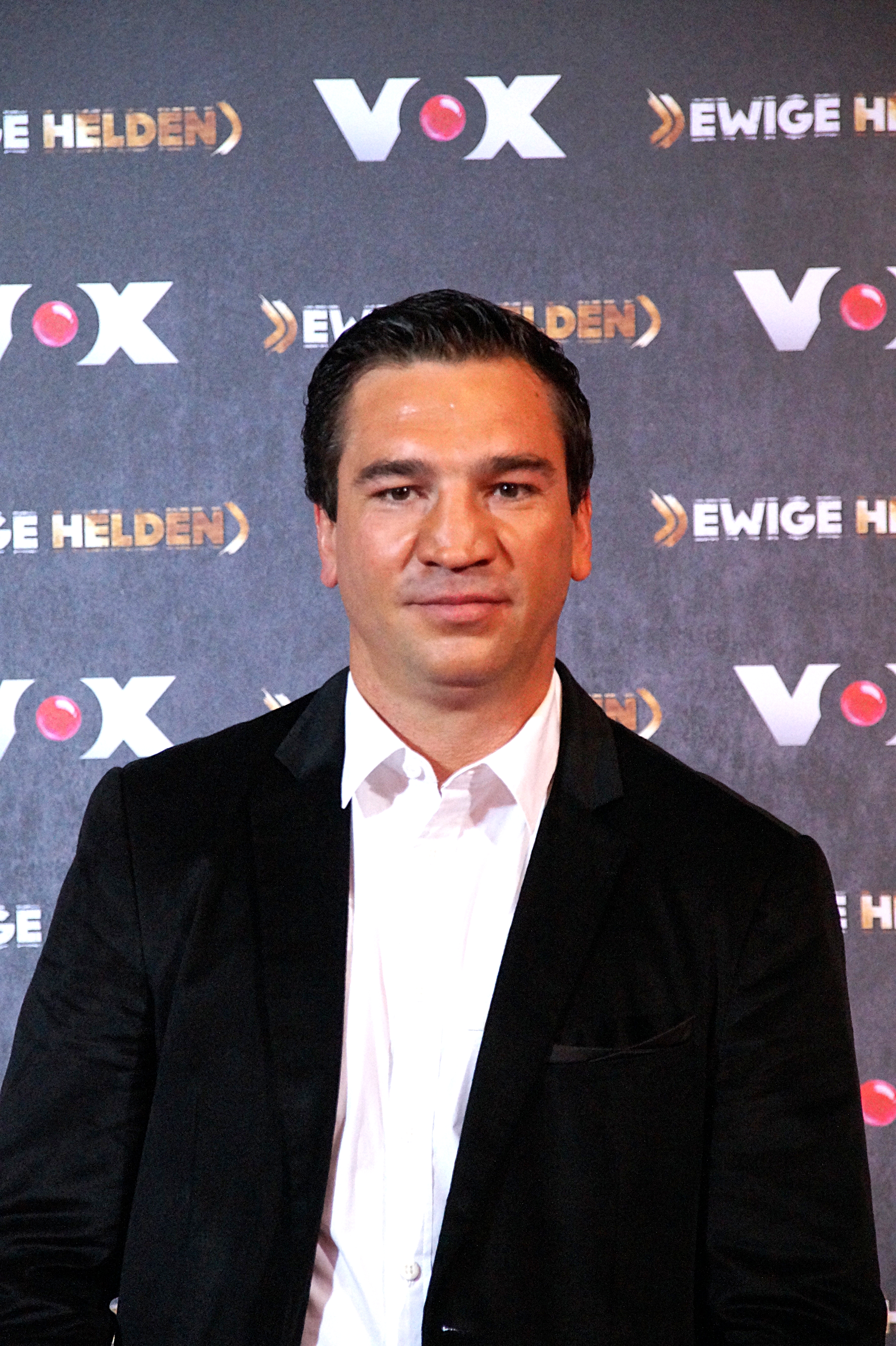 Markus Beyer beim VOX "Ewige Helden" Pressetermin, im Dezember 2015.